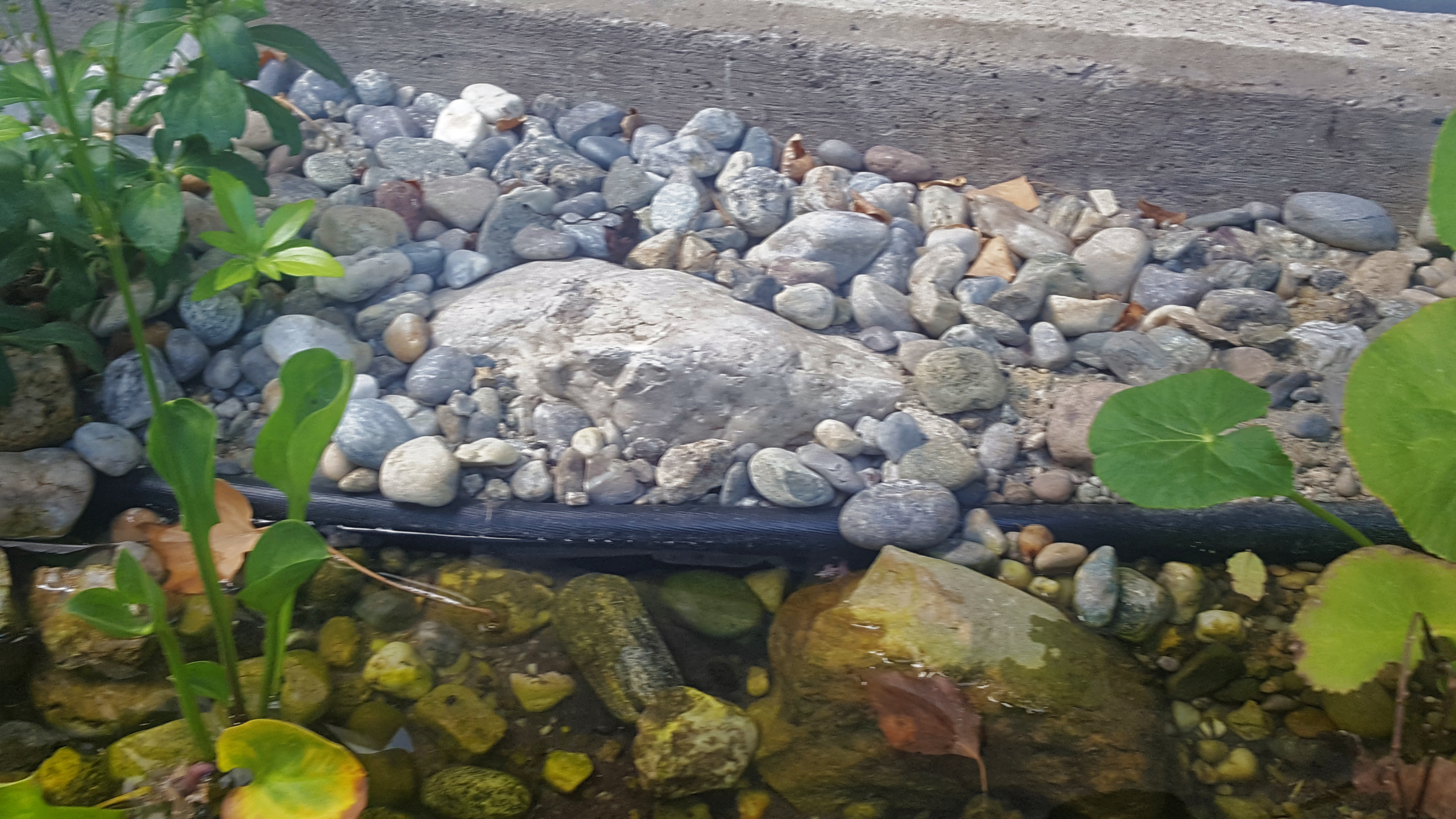 Teichrand mit offener Folie, die beim Betreten des Teichrands offen gelegt wurde.